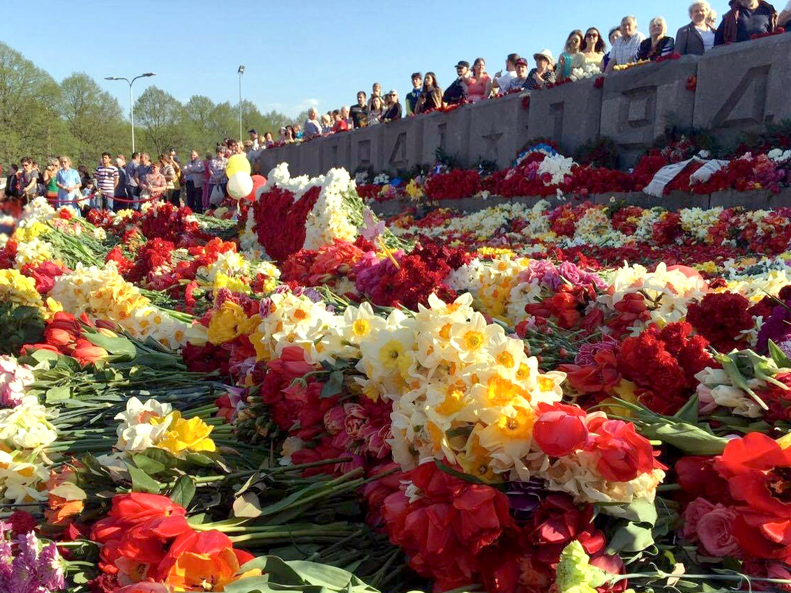 Uzvaras parks. Uzvaras piemineklis. Rīga 9 maijs 2016.